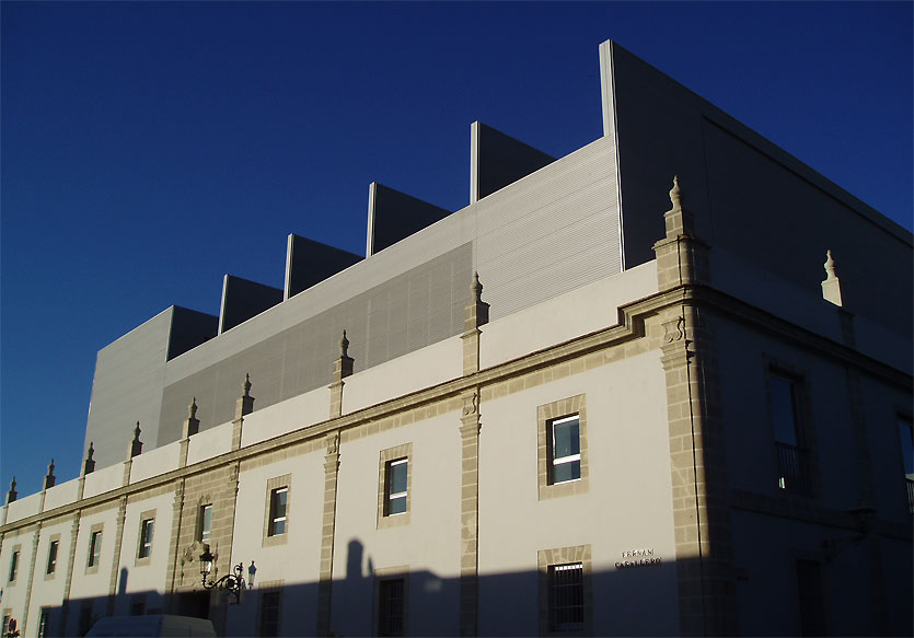 Teatro Municipal Pedro Muñoz Seca de El Puerto de Santa María, España.